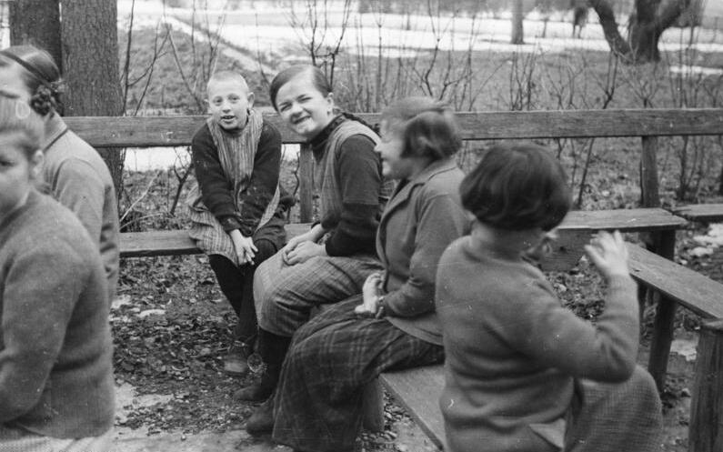 Heilanstalt Schönbrunn bei Dachau. - SS-Foto, 16.2.1934